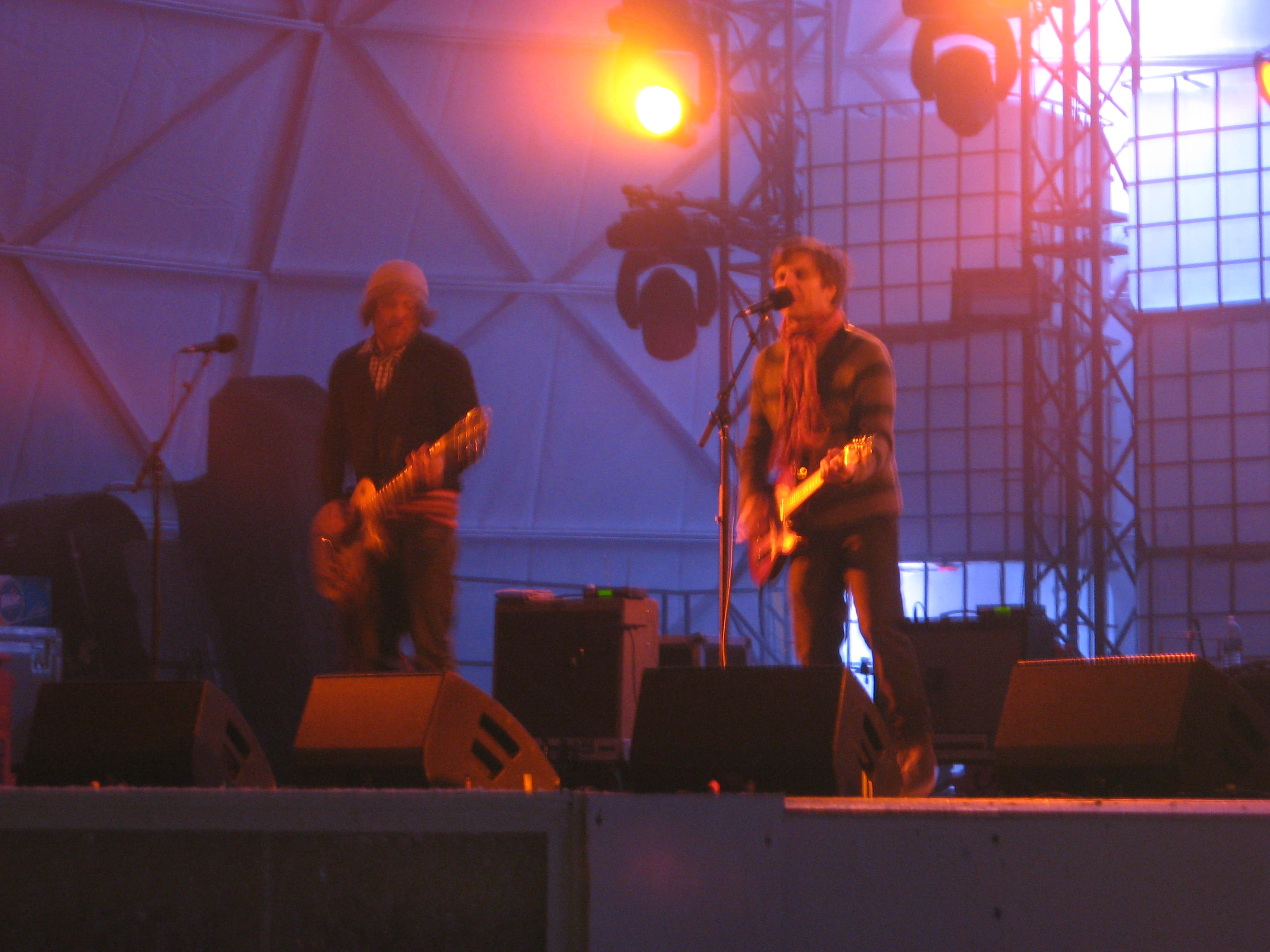 Les Trois Accords au Carnaval de Québec 2011